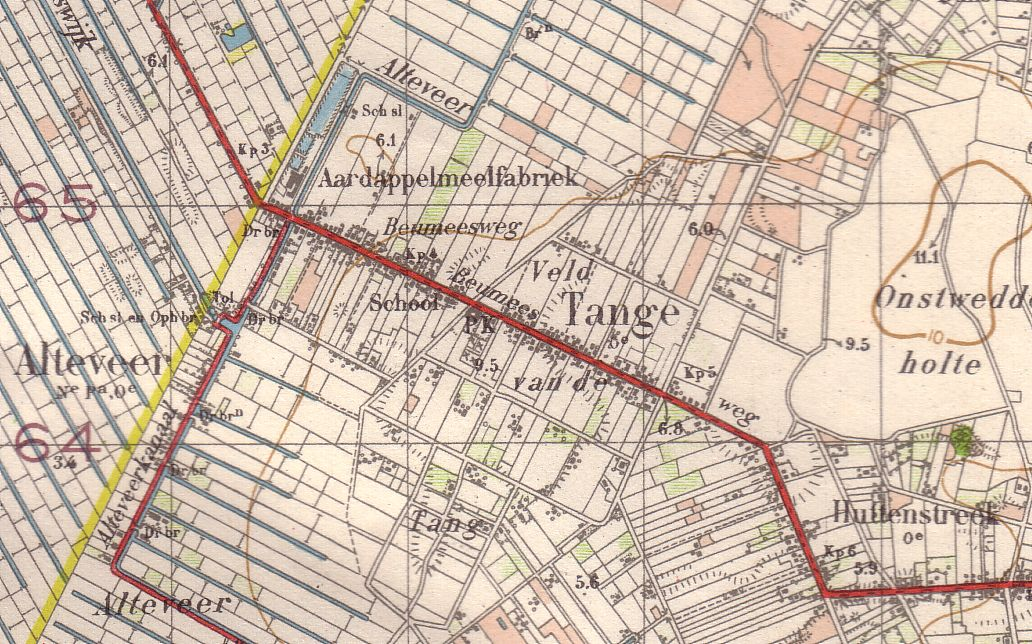 Tange-Alteveer op de topografische kaart van 1933